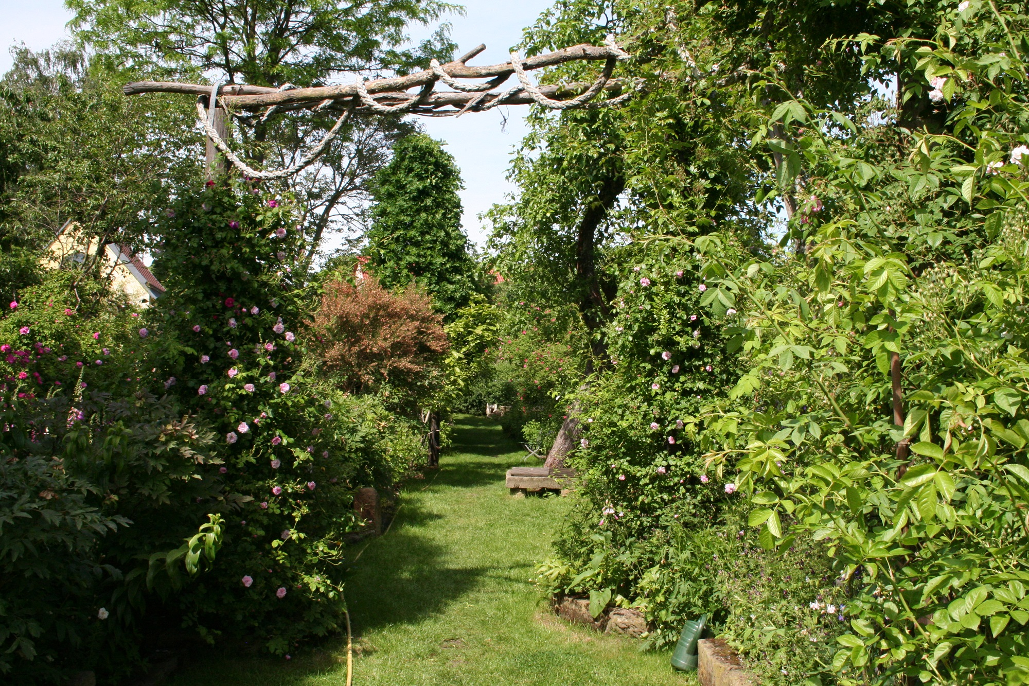 Pfarrgarten Saxdorf (Mai 2014)